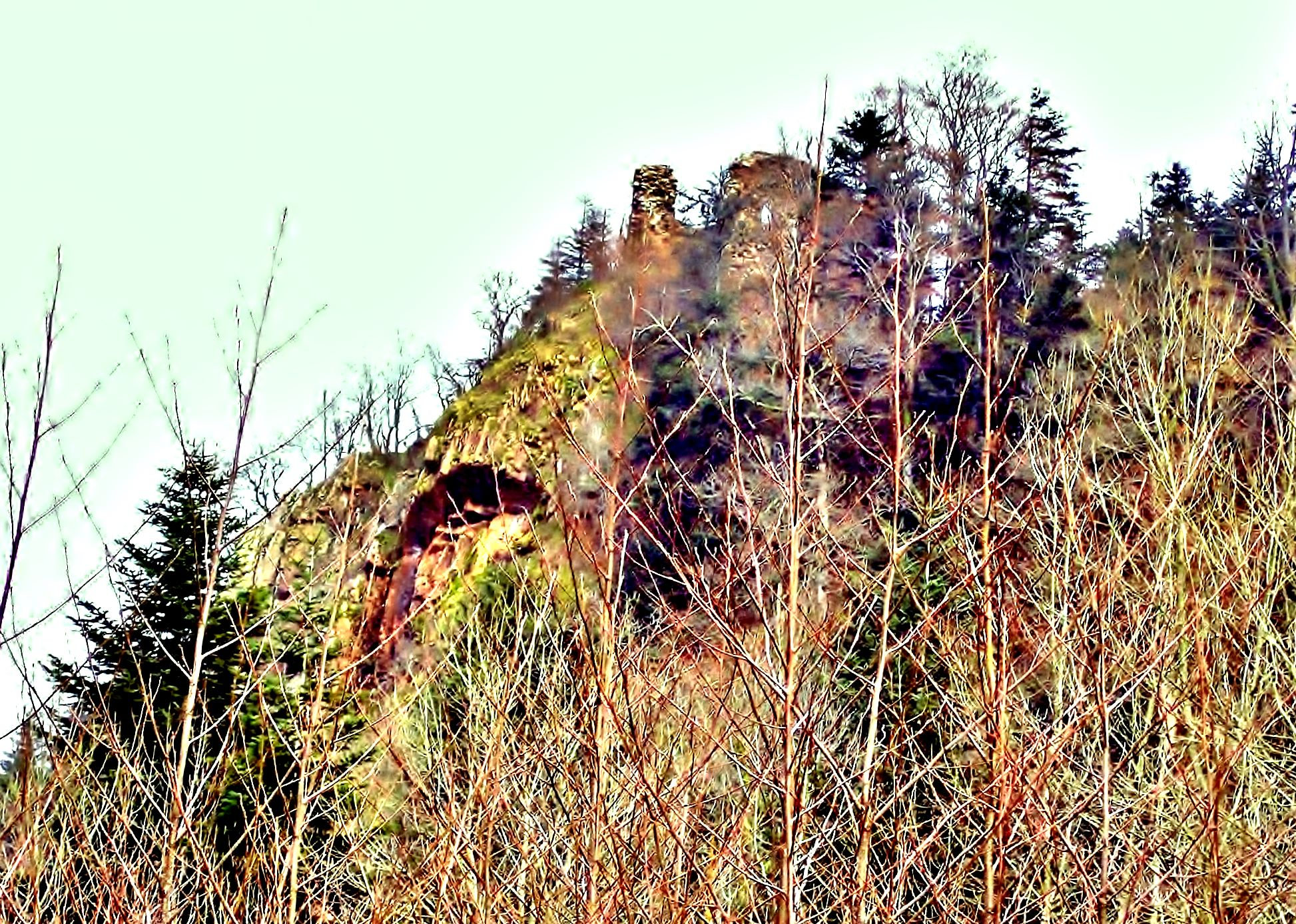 Ruines du château de Rosemont, vues de la route Vescemont-Riervescemont. Territoire de belfort